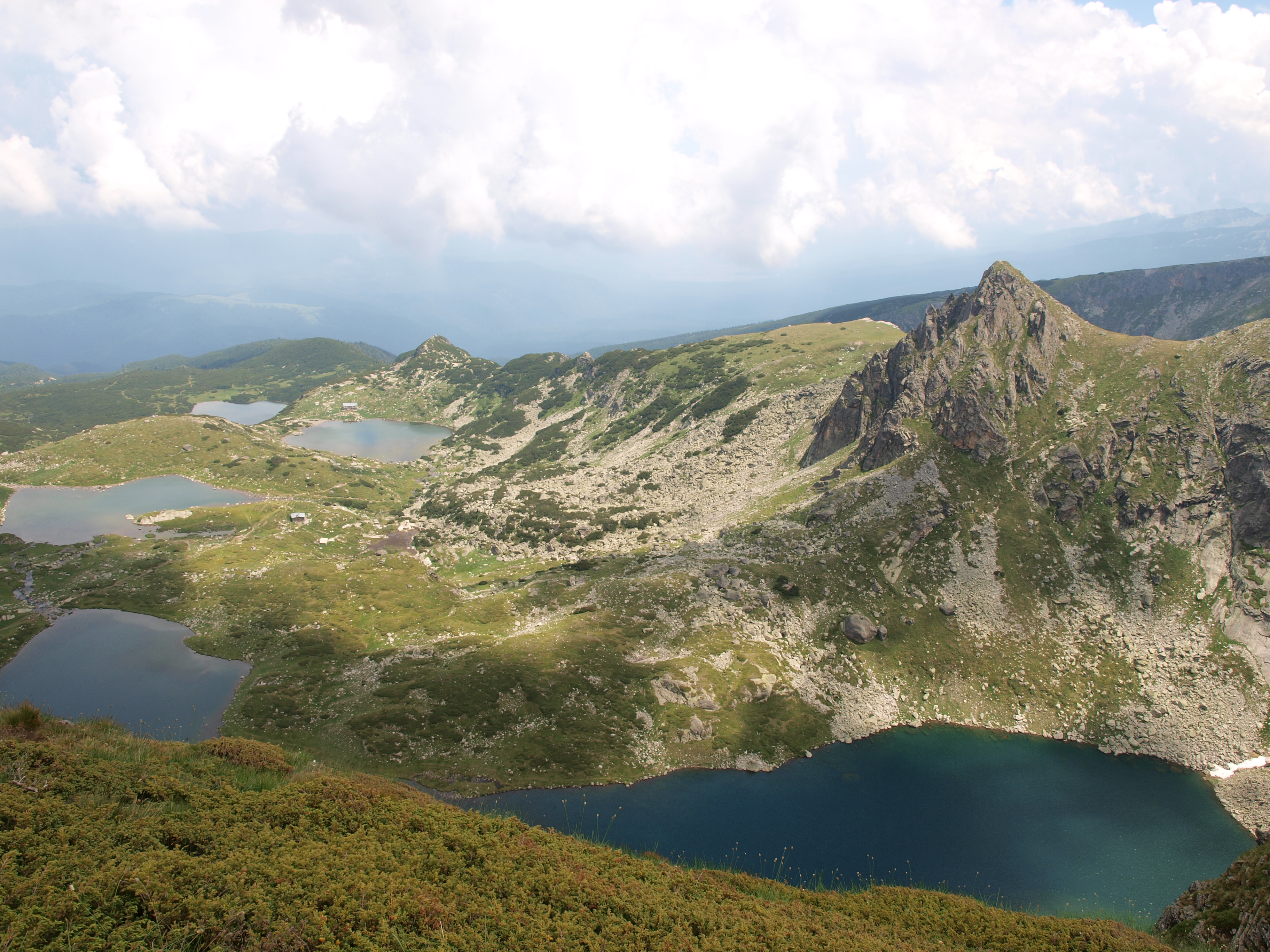 Рила, Рила